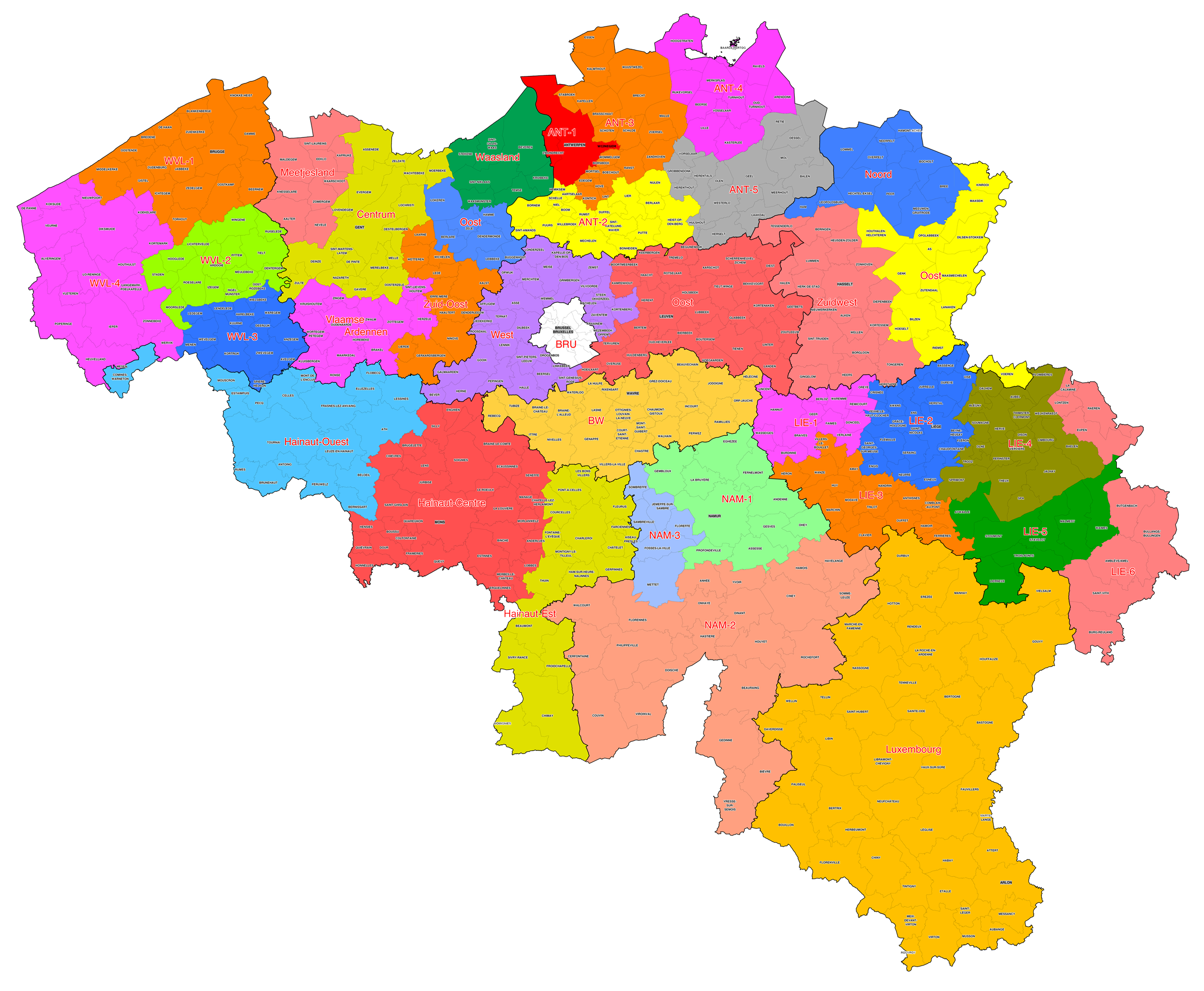 De 34 hulpverleningszones (plus Brussel) in België